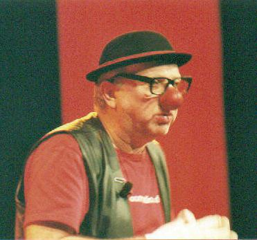 Urheberrecht bei "Divinho".